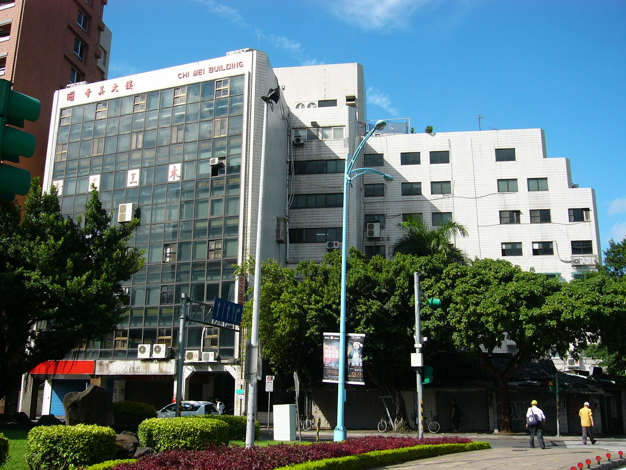 奇美大樓，位於臺灣臺北市中正區愛國西路9號。